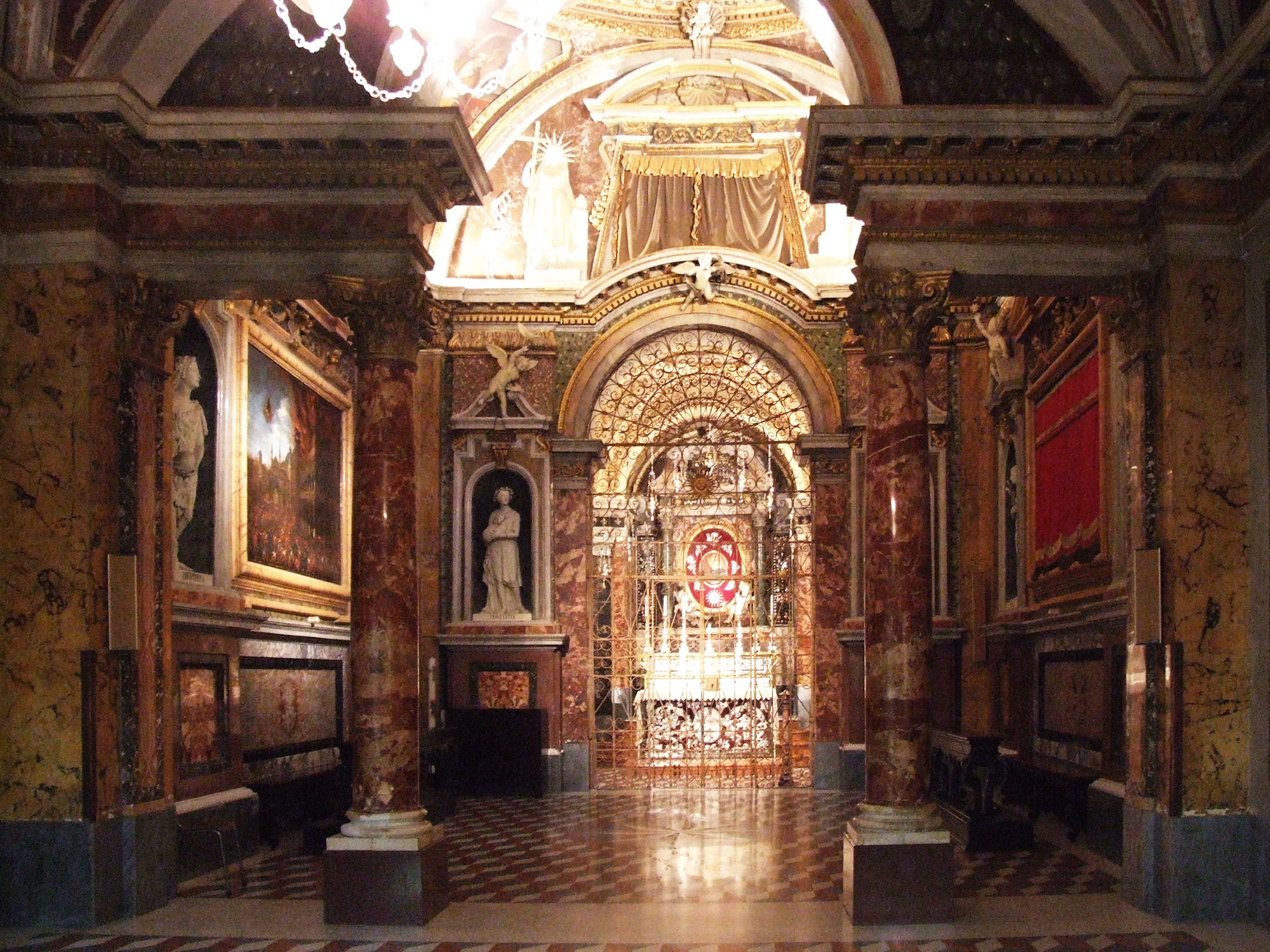 Basilica di San Nicola a Tolentino Native nameBasilica di San Nicola da TolentinoLocationTolentino, ItalyCoordinates43° 12′ 28″ N, 13° 17′ 06″ E Established14th-17th centuriesWeb page control : Q3635709 VIAF: 129156352 GND: 1087192536